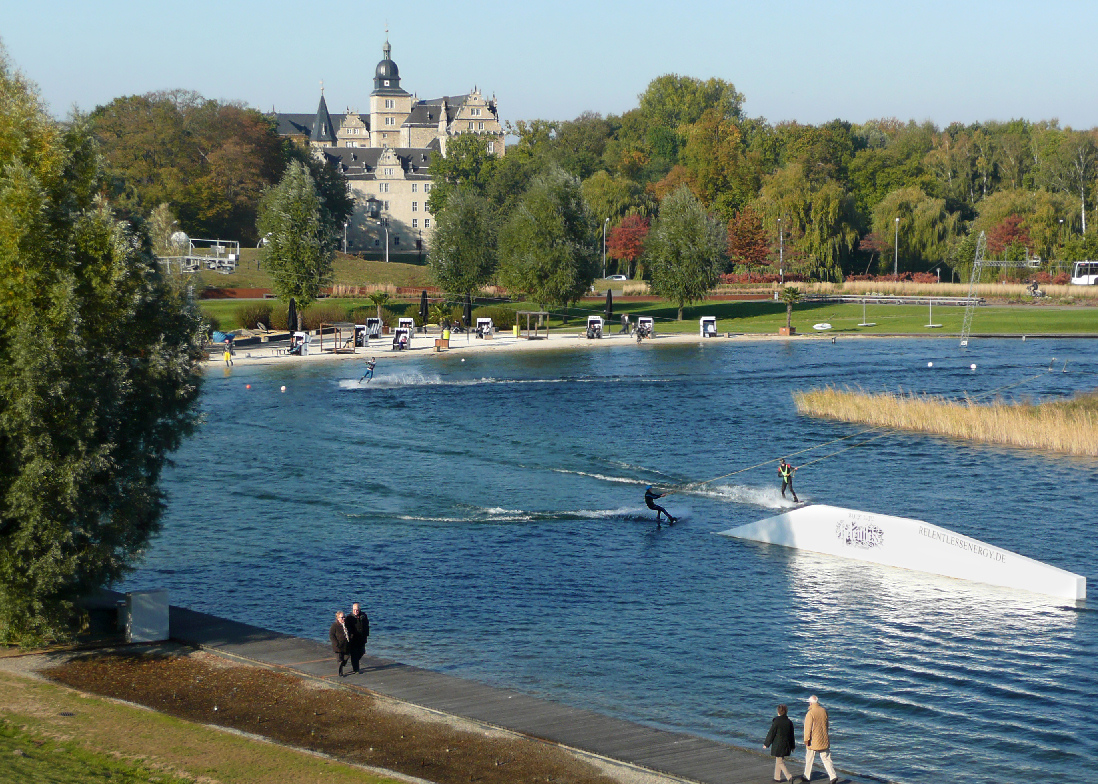 Allerpark und Schloss Wolfsburg